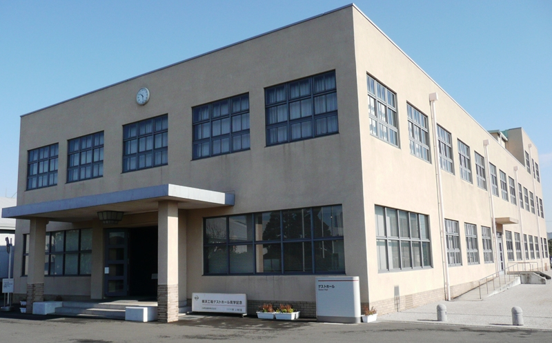 Nissan Guest Hall.